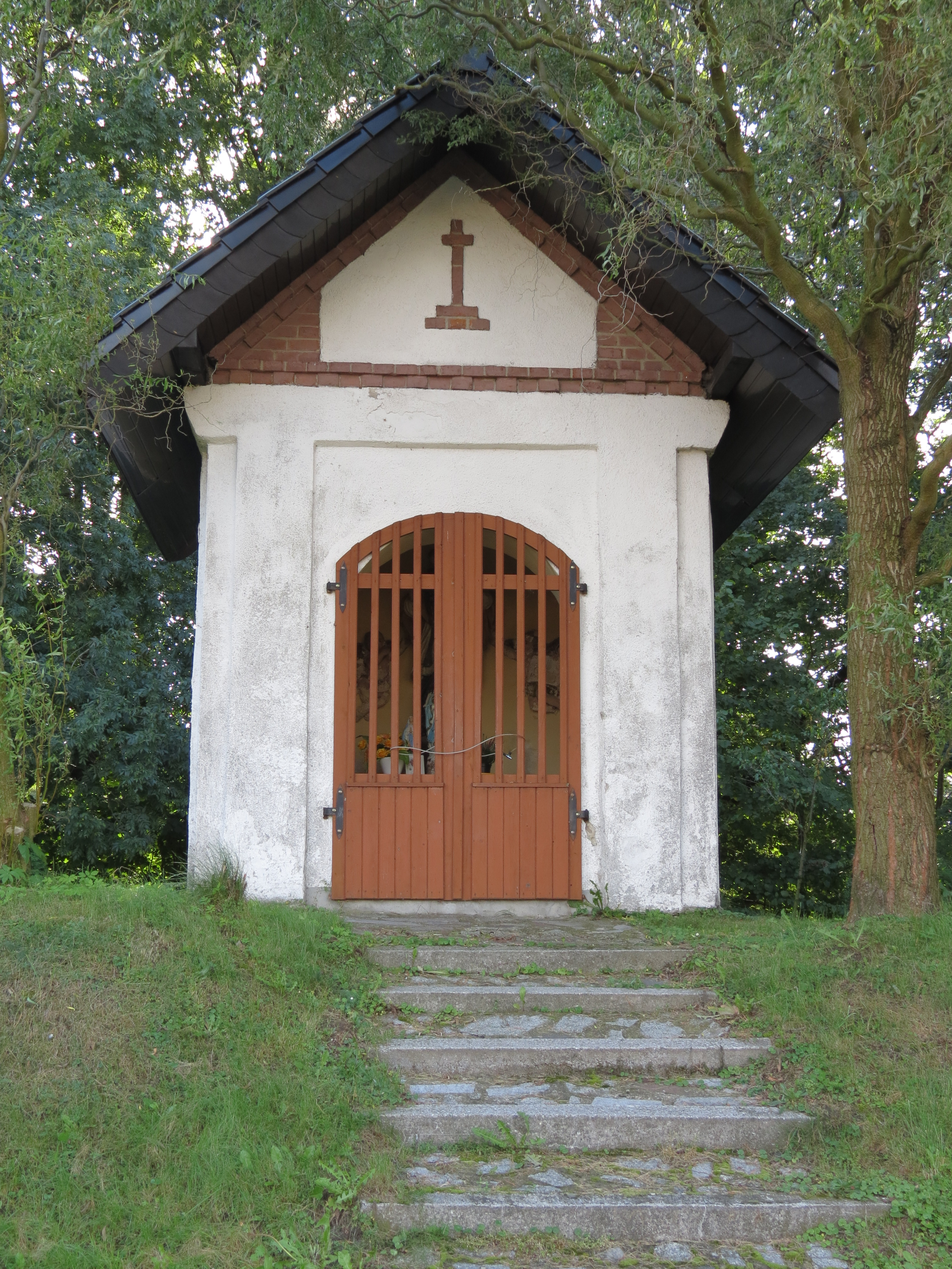 Kapliczka przydrożna z 1780 r.; Łany Wielkie, ul. Wiejska (za numerem 2), gmina Sośnicowice, powiat gliwicki